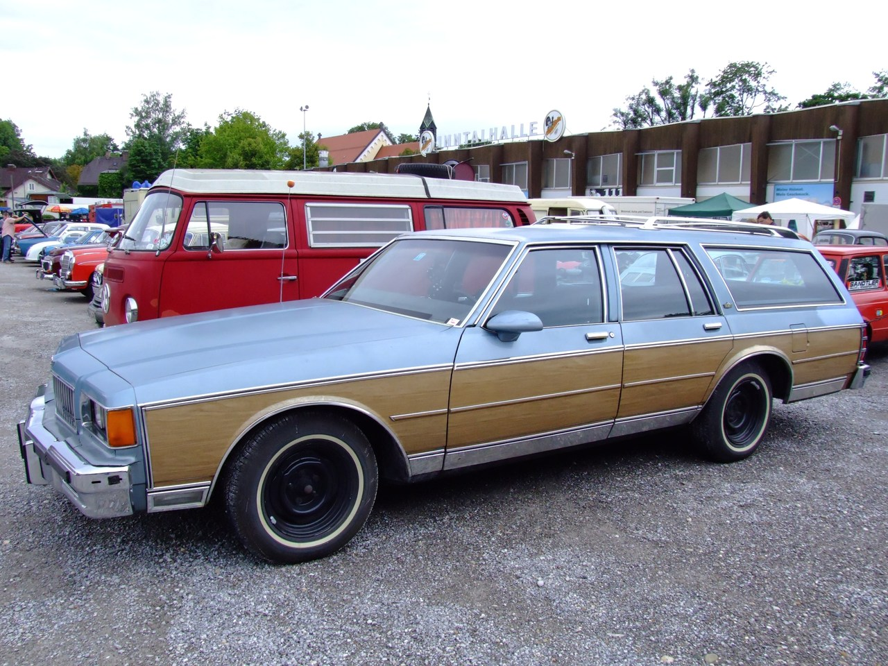 Quelle: selbst fotografiert, 07/2007 Fotograf: Späth Chr.